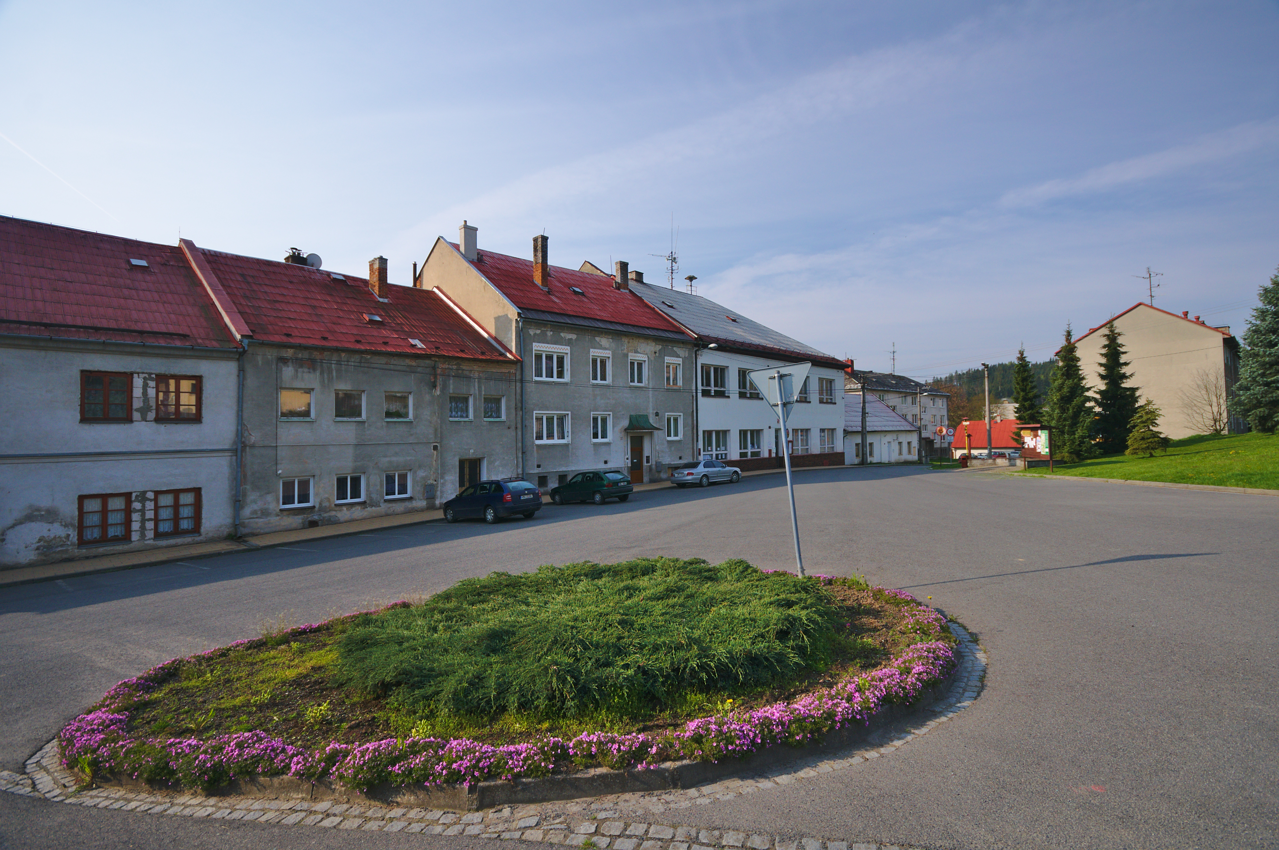 Náves, Domašov nad Bystřicí, okres Olomouc